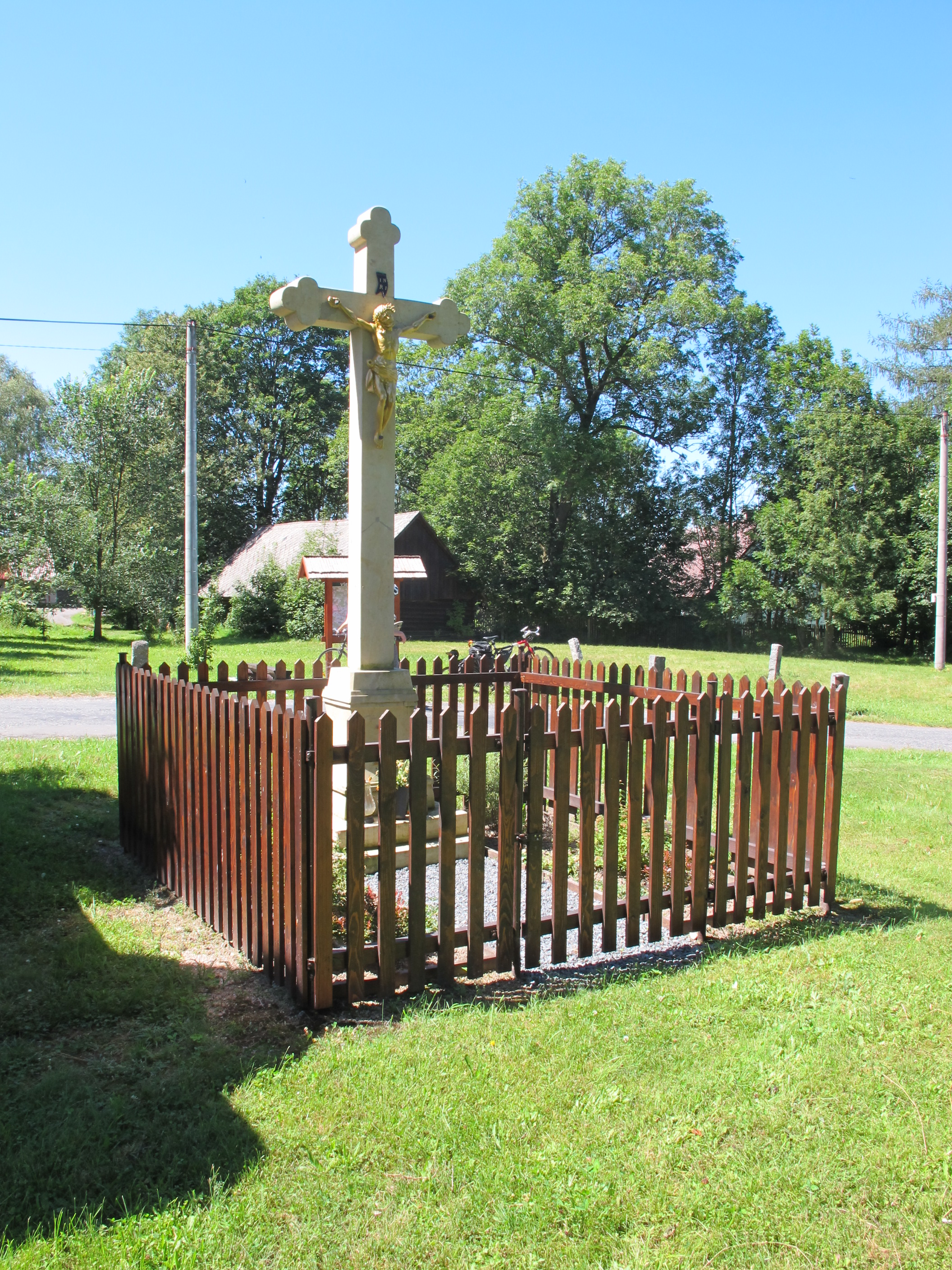 Všeradov.